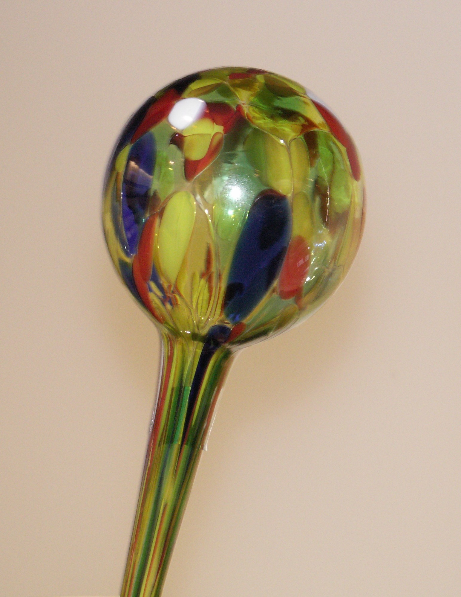 Durstkugel